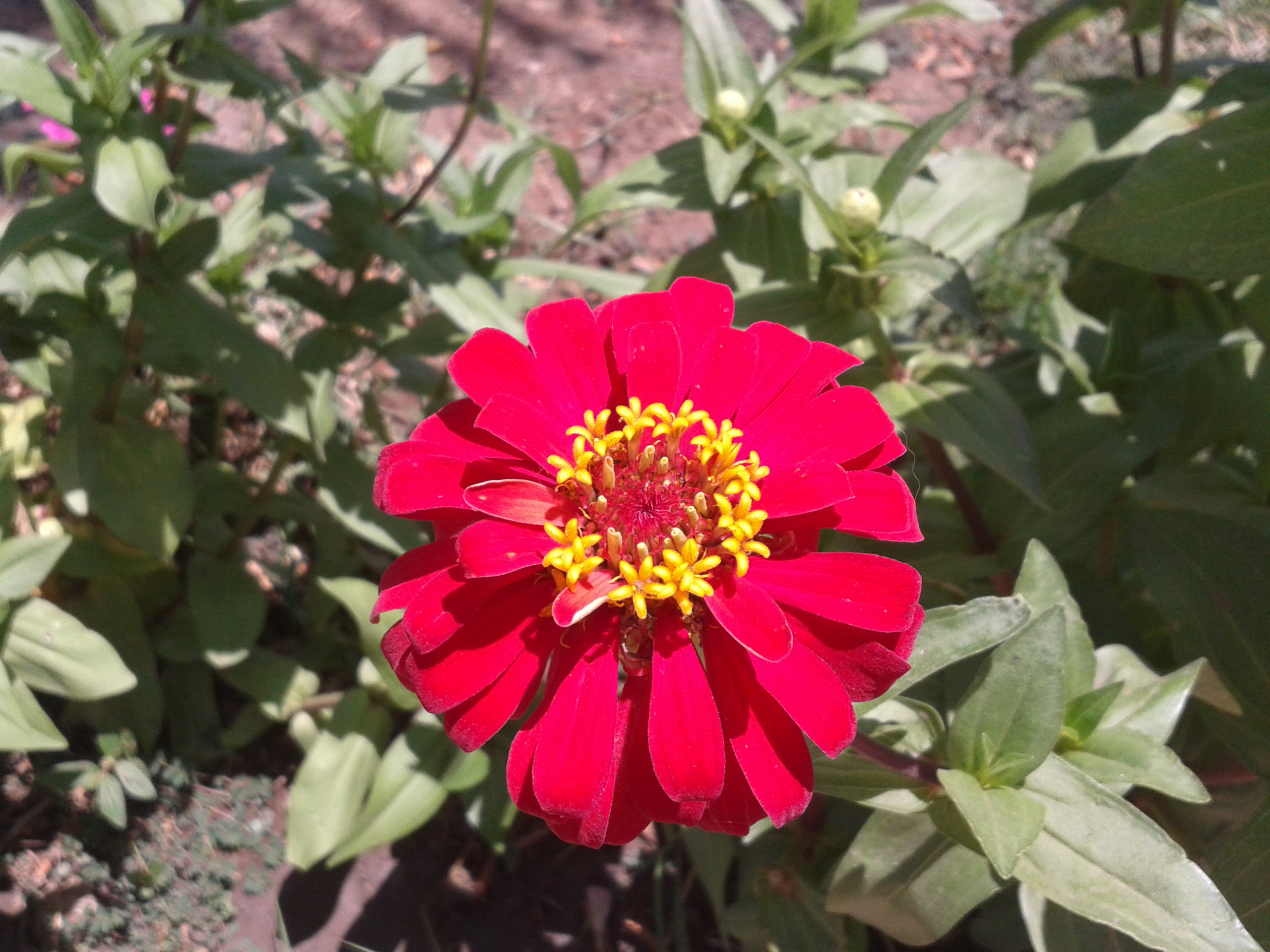 زهرة نبات الزنينا بجامعة الازهر بالقاهرة مدينة نصر